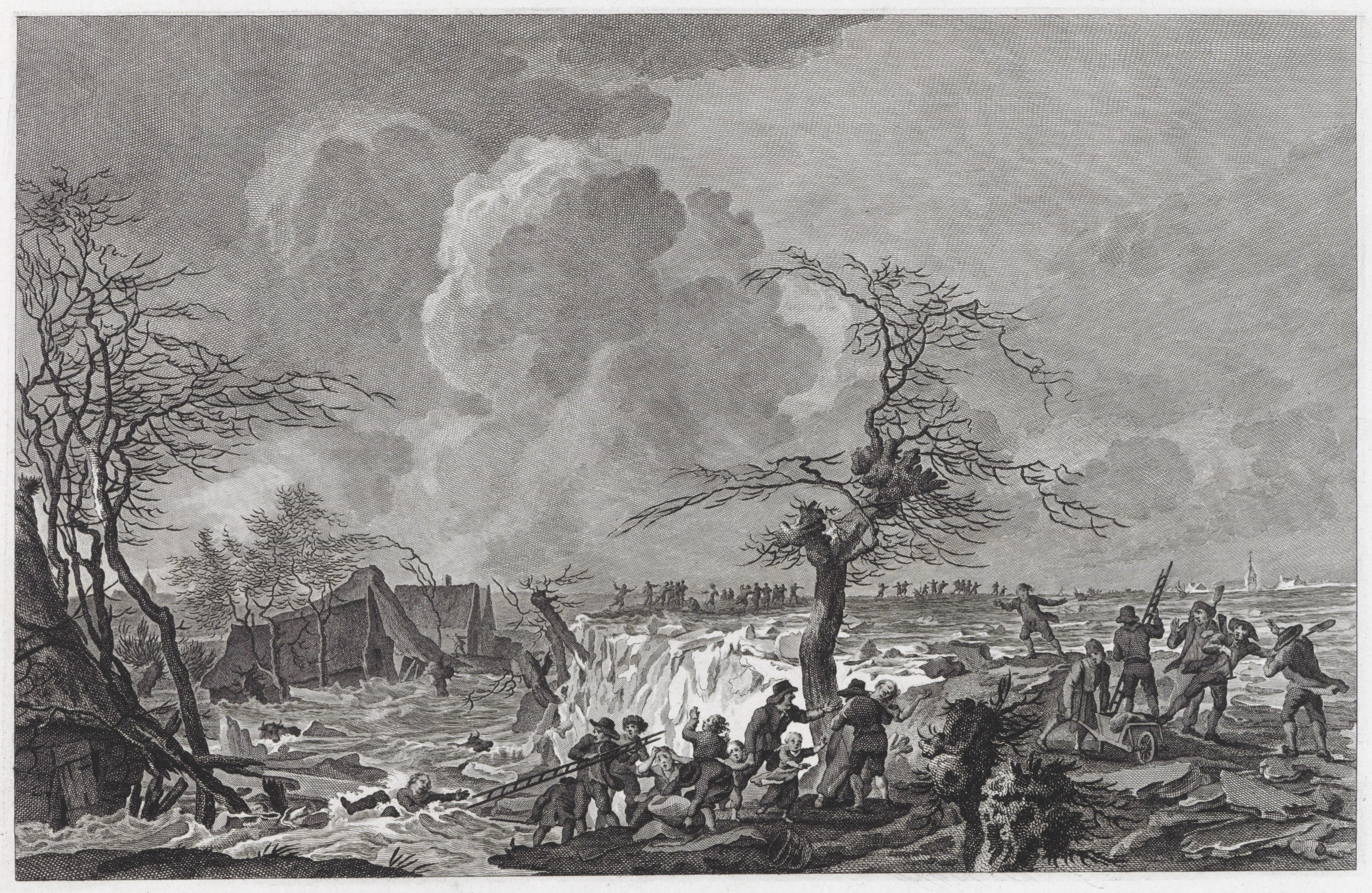 IdentificatieTitel(s): Dijkdoorbraak bij Doornik, 1799Objecttype: prent Objectnummer: RP-P-1944-1865Catalogusreferentie: FMH 5519-b/3Opmerking: staat vóór de letterOpschriften / Merken: verzamelaarsmerk, verso, gestempeld: Lugt 2228Omschrijving: Doorbraak van Waaldijk bij Doornik, tussen Bemmel en Lent, 21 februari 1799. Onderdeel van een groep van zes platen van dijkdoorbraken en watersnood in het zuidelijk deel van Gelderland in februari 1799.VervaardigingVervaardiger: prentmaker: Reinier Vinkeles (I)prentmaker: Cornelis Brouwernaar tekening van: Cornelis van HardenberghPlaats vervaardiging: prentmaker: Nederlandprentmaker: Nederlandnaar tekening van: DoornikDatering: 1799 - 1800Fysieke kenmerken: ets en gravure, proefdruk vóór de letterMateriaal: papier Techniek: etsen / graveren (drukprocedé)Afmetingen: plaatrand: h 225 mm × b 325 mmToelichtingGebruikt als illustratie in: Cornelis Zillesen, Beschryving van den watersnood, van't jaar MDCCXCIX. Amsterdam: Johannes Allart, 1800.OnderwerpWat: dike-breakstorm on landWatersnood februari 1799Wanneer: 1799-02-21 - 1799-02-21Waar: DoornikWaalVerwerving en rechtenVerwerving: aankoop 1881Copyright: Publiek domein